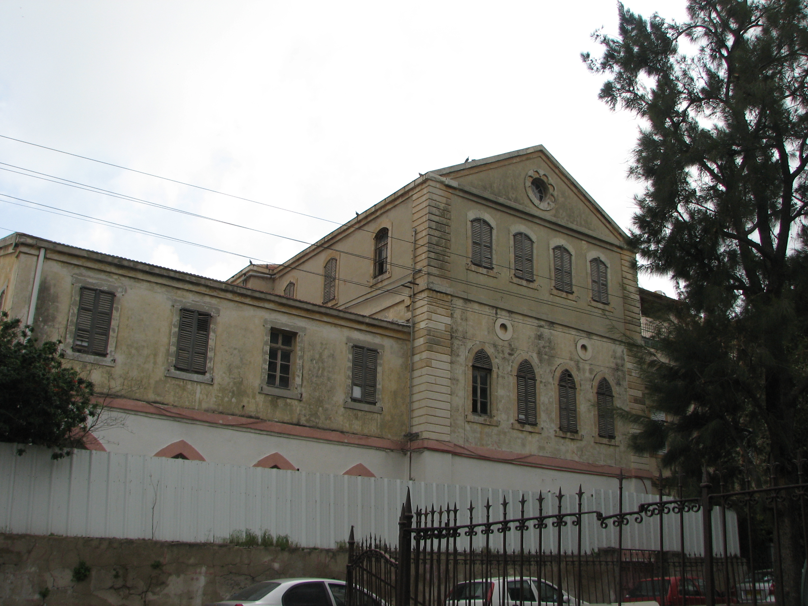 Hardegg Institute, German Colony of Haifa , Israel מכון הרדג בשכונה הגרמנית בחיפה. שימש בתחילה בית ספר חקלאי, לאחר מכן בית ספר לתיירות, בית חולים, כיום משמש כגן ילדים המופעל על ידי נזירות צד המבנה מרחוב מאיר רוטברג